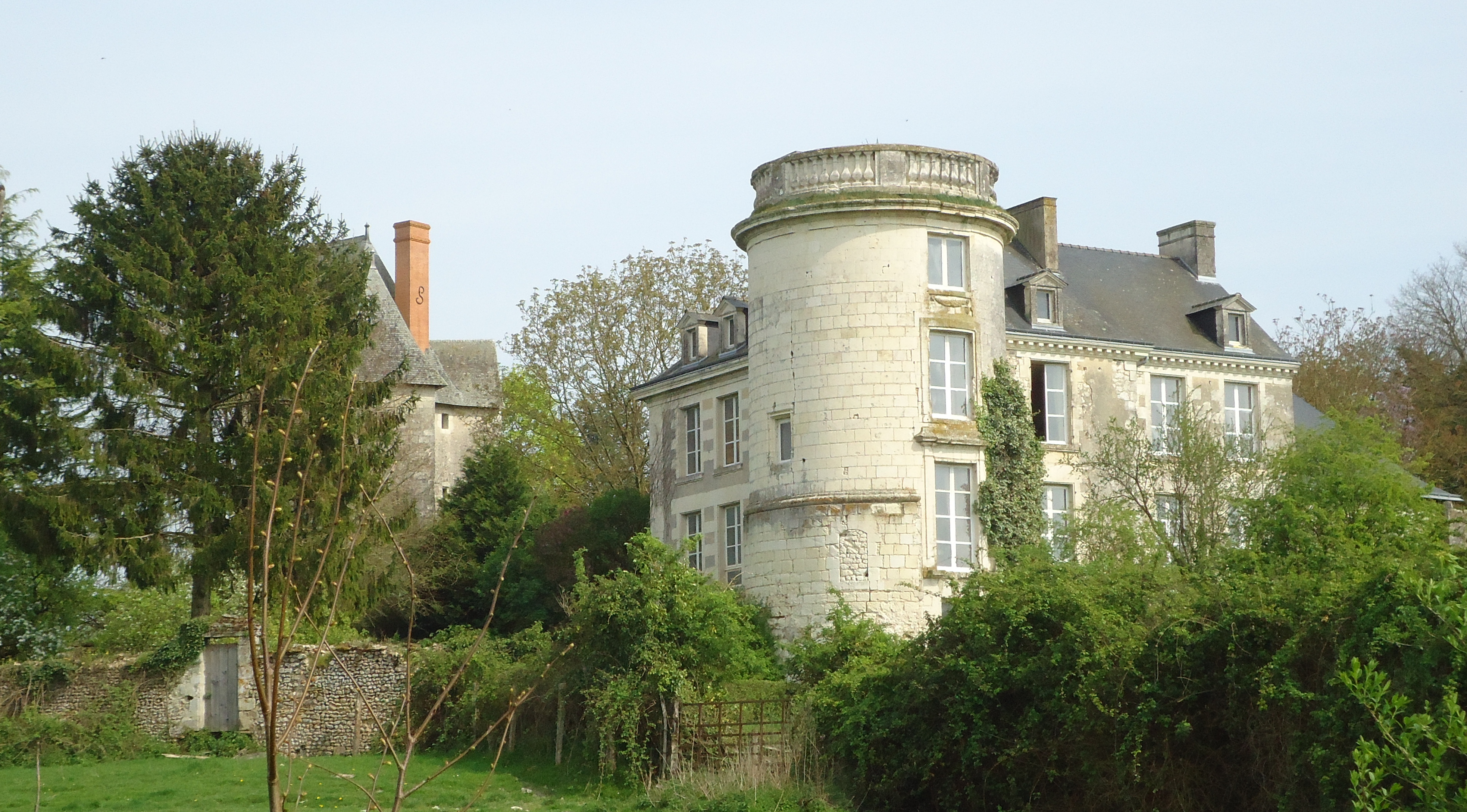 Château du Fort-des-Salles, XIVe, XVe & XVIIIe (Part. MH & ISMH)